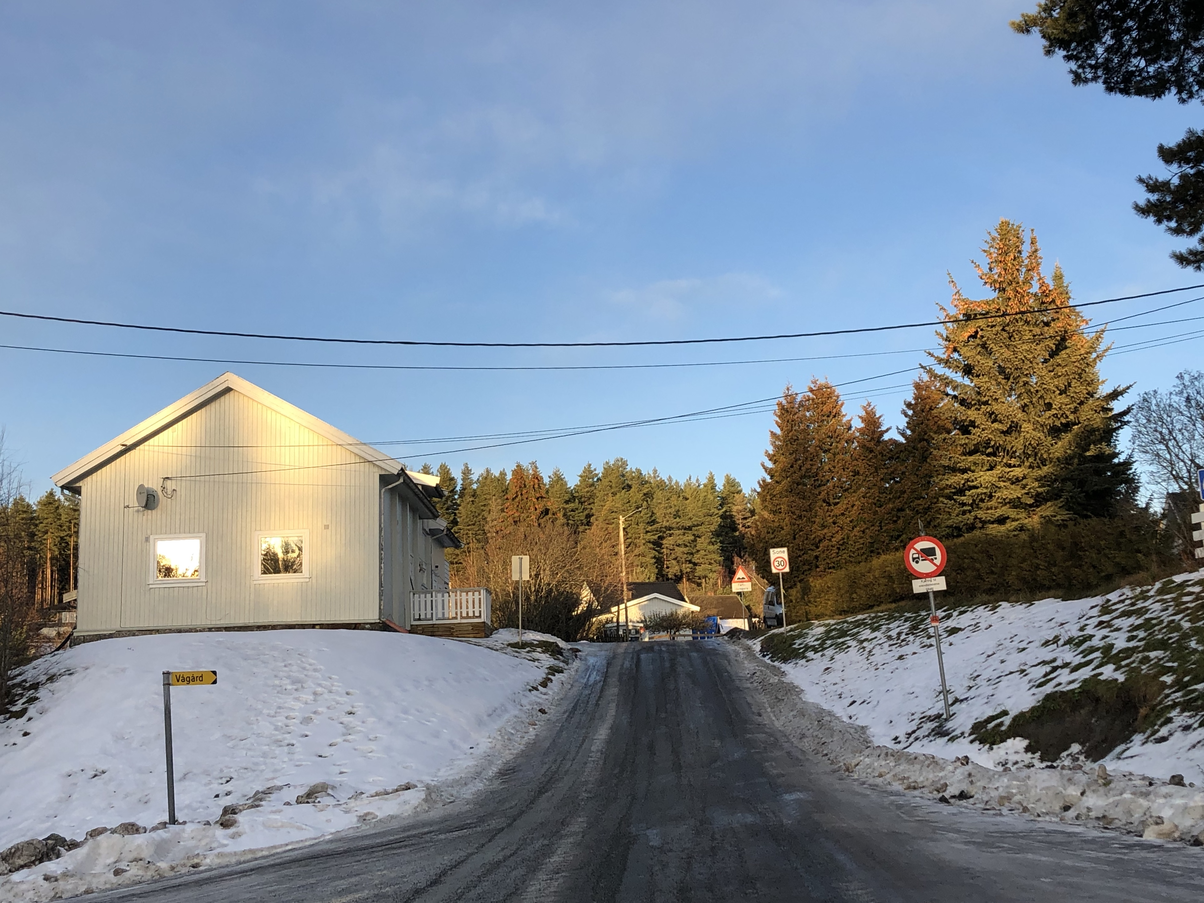 Nymobakken, Hen, Ringerike